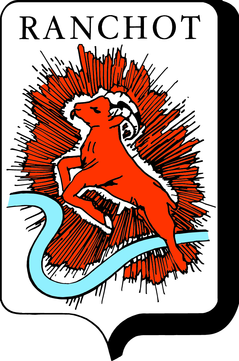 Armoirie de Ranchot